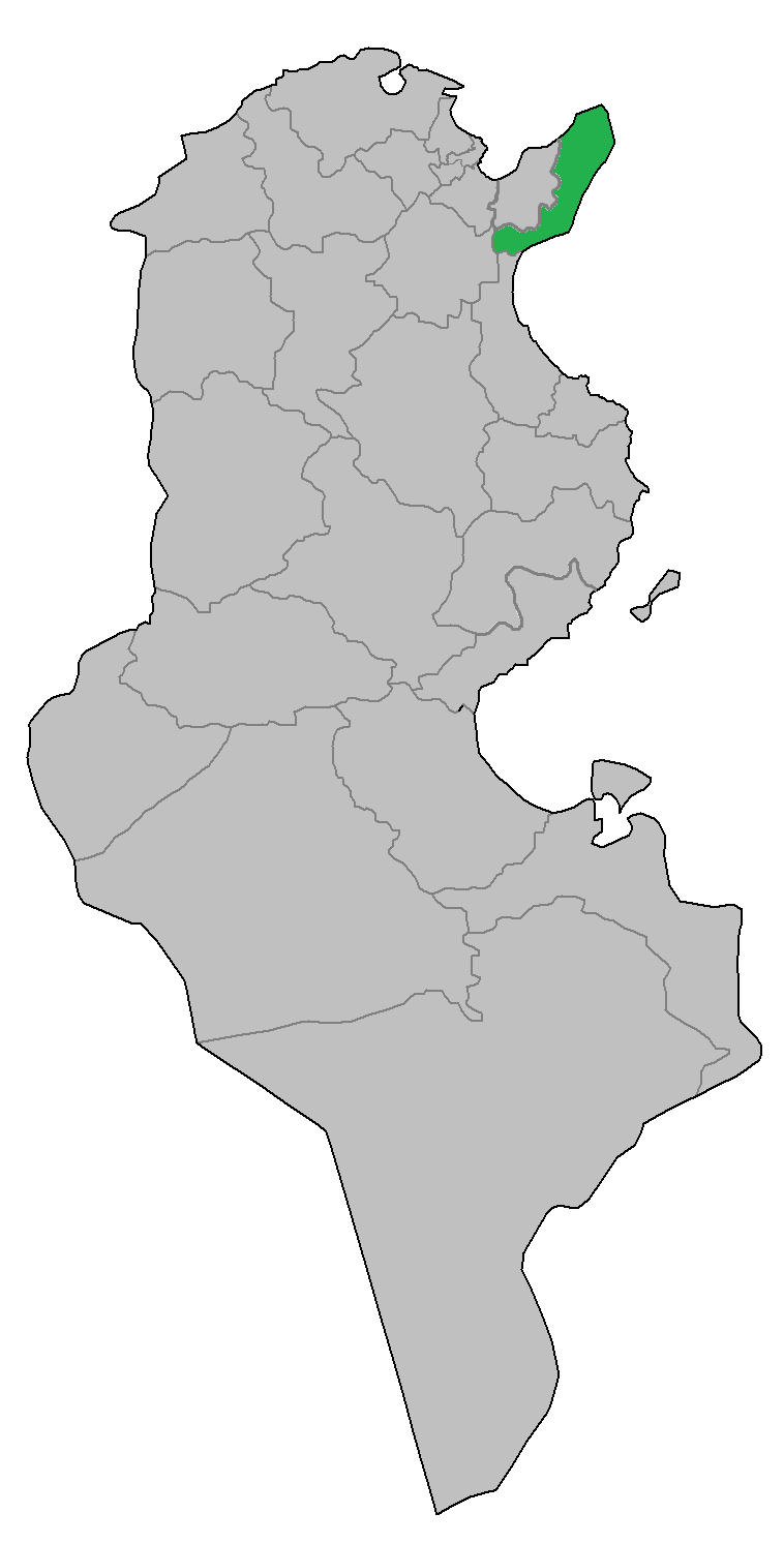 Circonscription électorale tunisienne